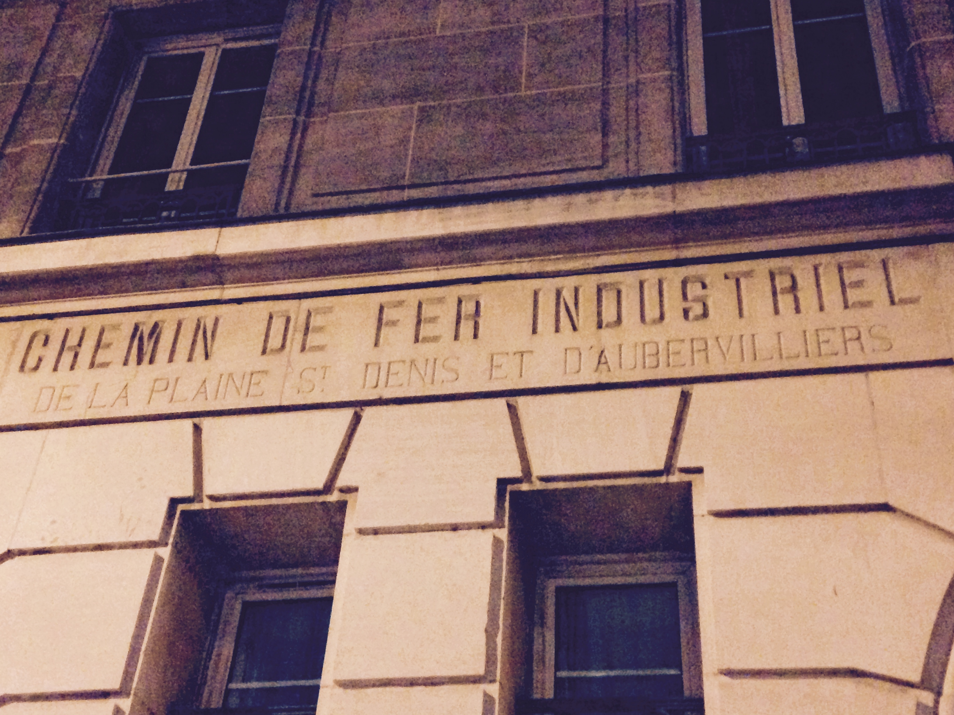 Détail de la façade du 124 de l'avenue du Président-Wilson à Saint-Denis, département de la Seine-Saint-Denis, France, ancien bâtiment de la Compagnie du chemin de fer industriel de la Plaine Saint-Denis et d'Aubervilliers.